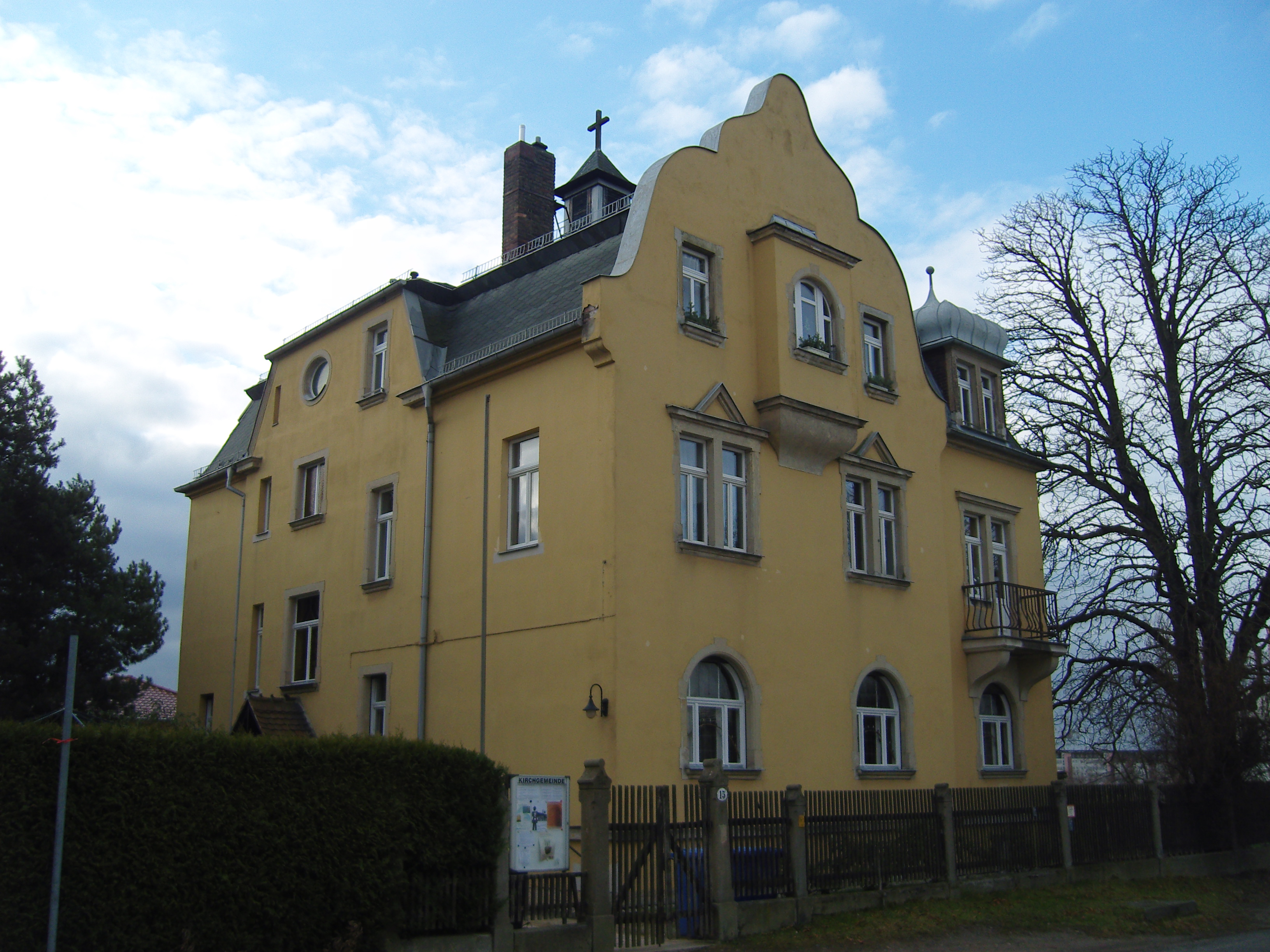 Denkmalgeschützte Villa in der Homiliusstraße 15 in Dresden-Mickten; Gemeindezentrum